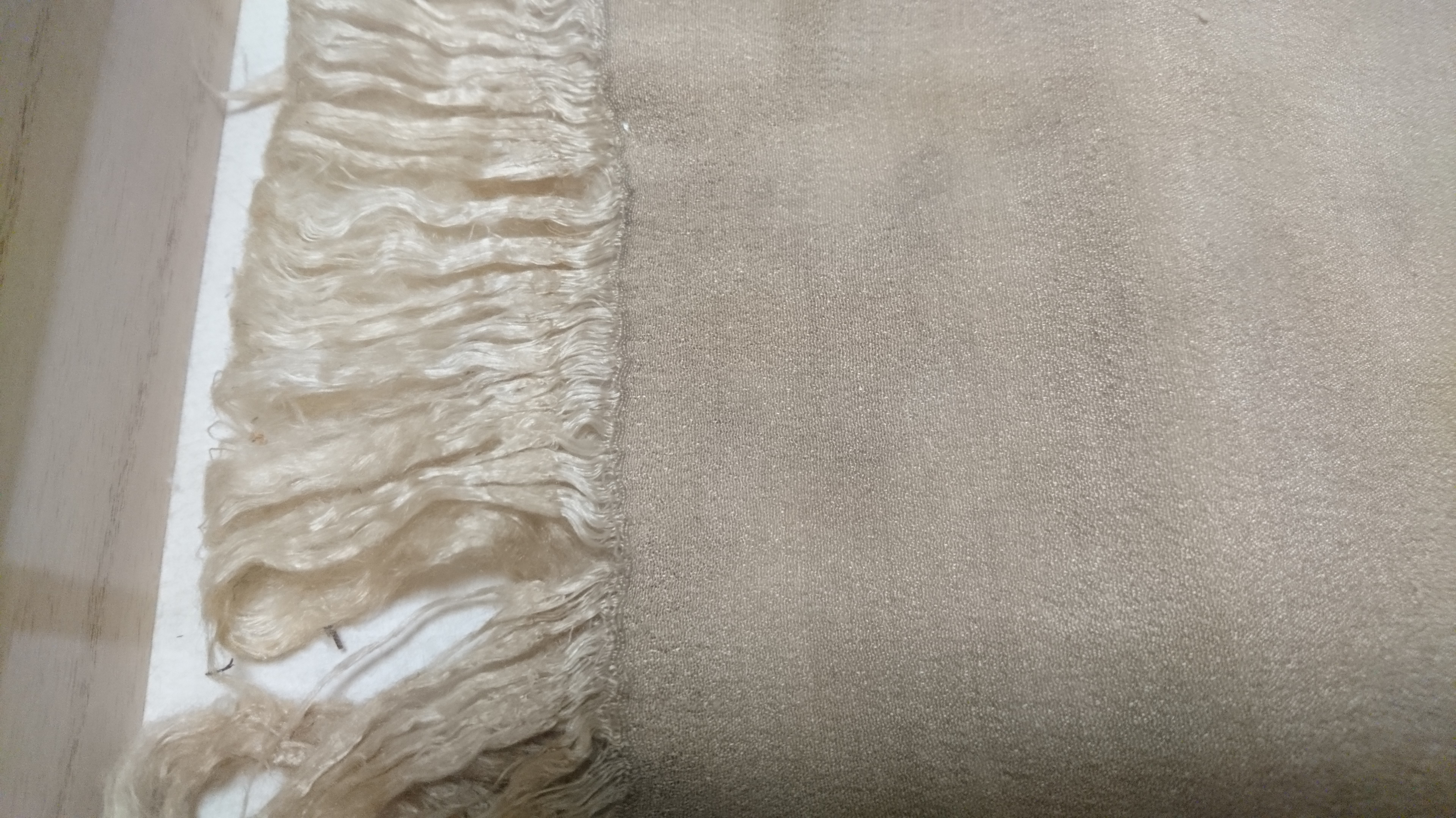 1720年（享保5年）絹屋佐平治が最初に織りあげたとされる丹後ちりめん。禅定寺所蔵。